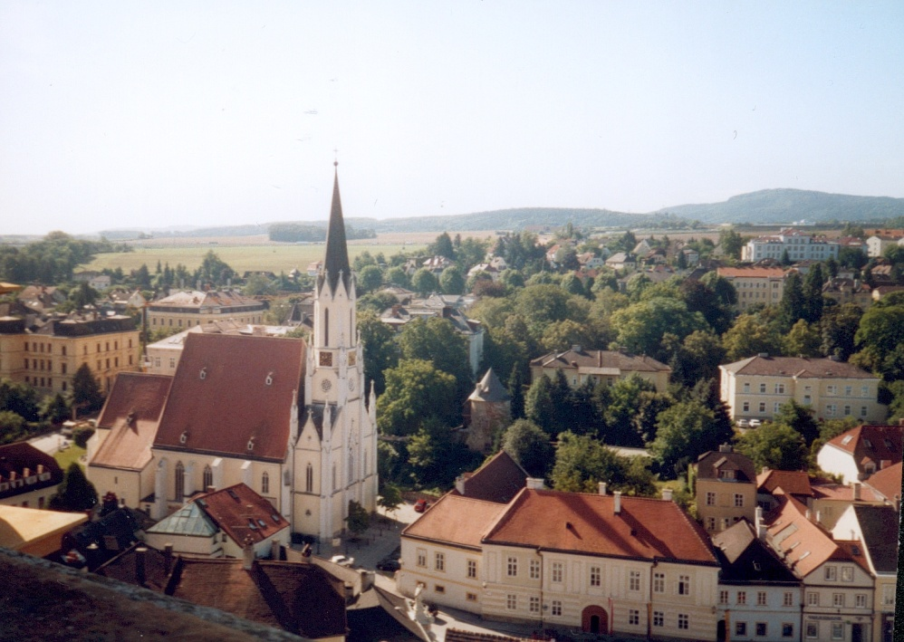 Melk (A) 2004 - Blick vom Stift auf die Stadt